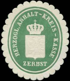 Sealing stamp Title: H. Anhalt-Kreis-Kasse Zerbst Description: grün, weiß, geprägt Place: Zerbst size: 4x3 cm